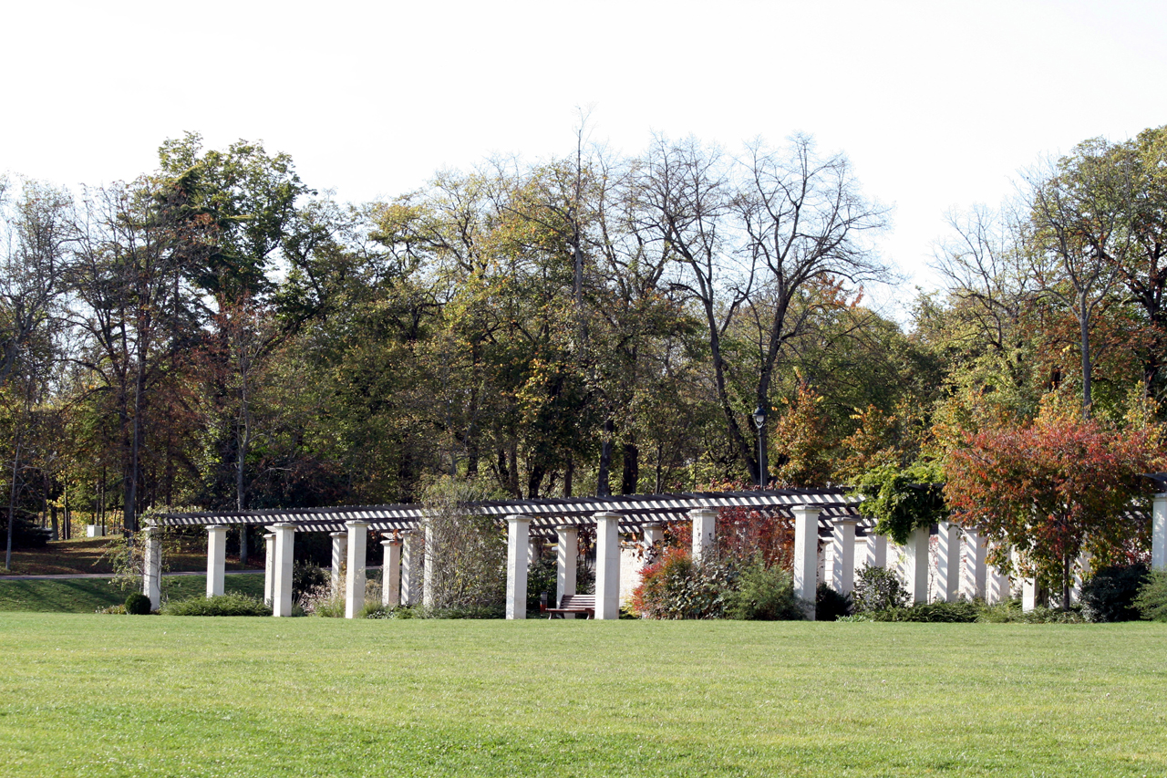 Jardin Blossac à Poitiers